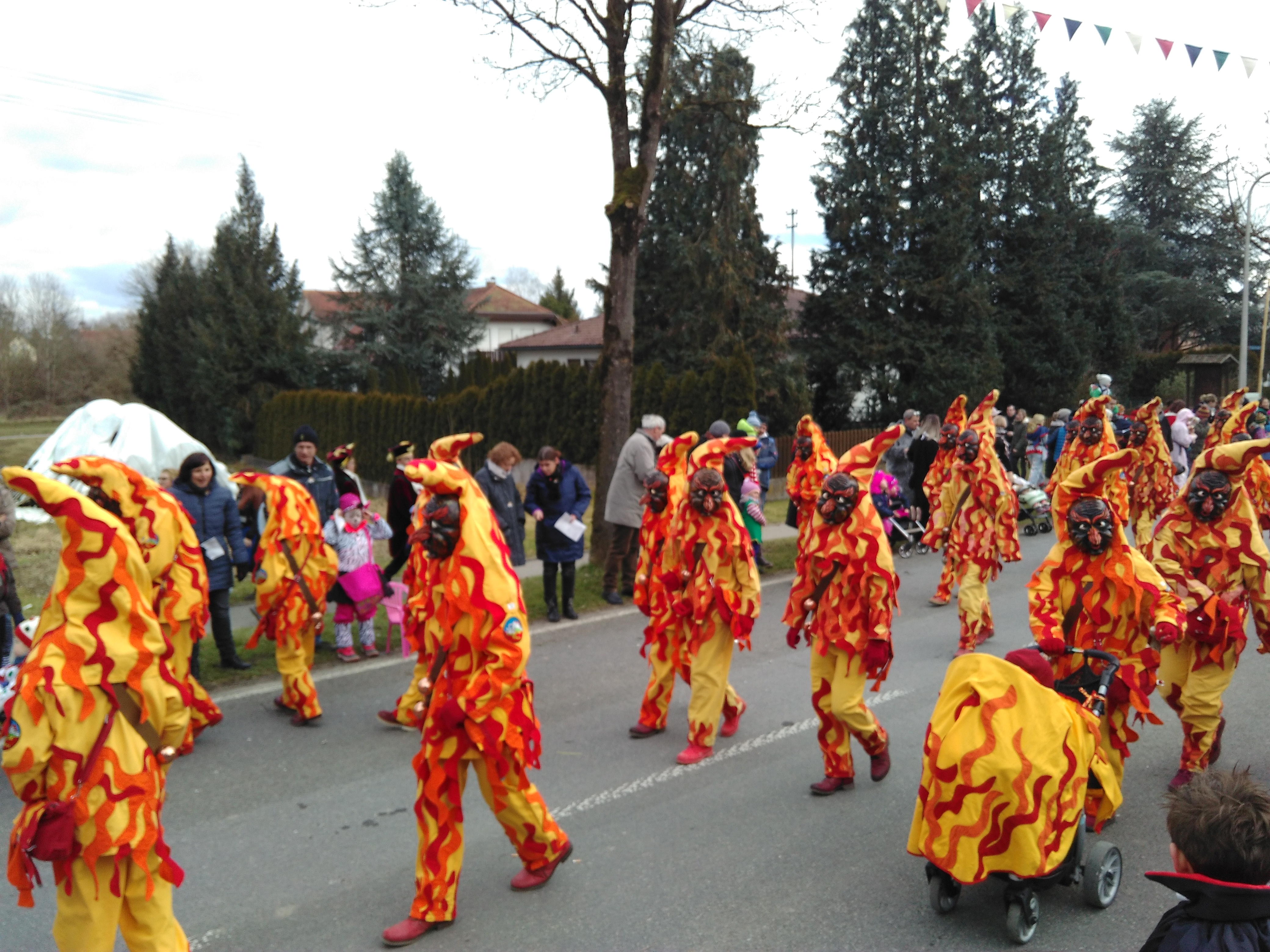 Die "Mußbrenner", eine der zentralen Fasnetsfiguren der Stadt Scheer an der Donau.